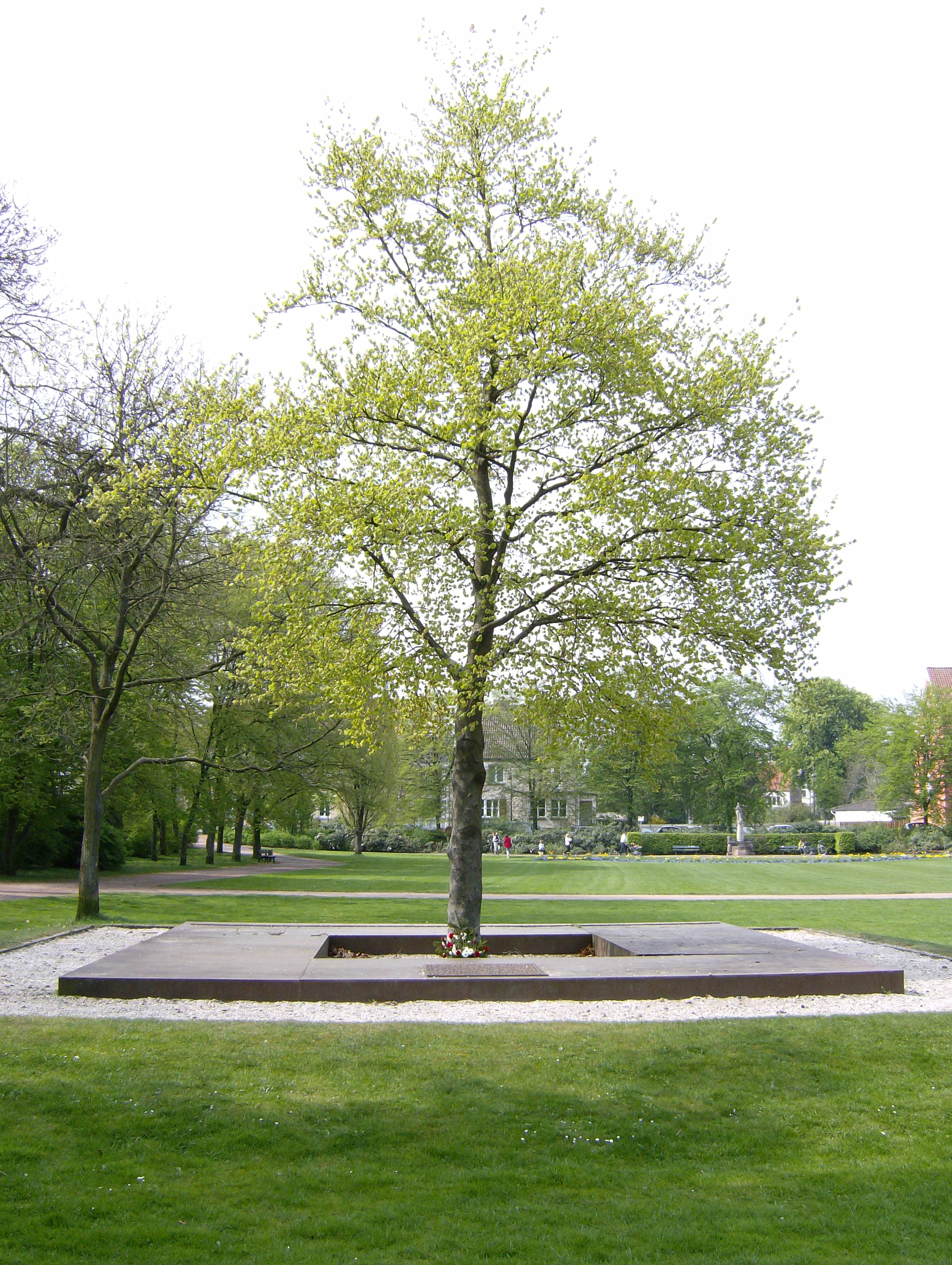 Denkmal "Celler Hasenjagd"